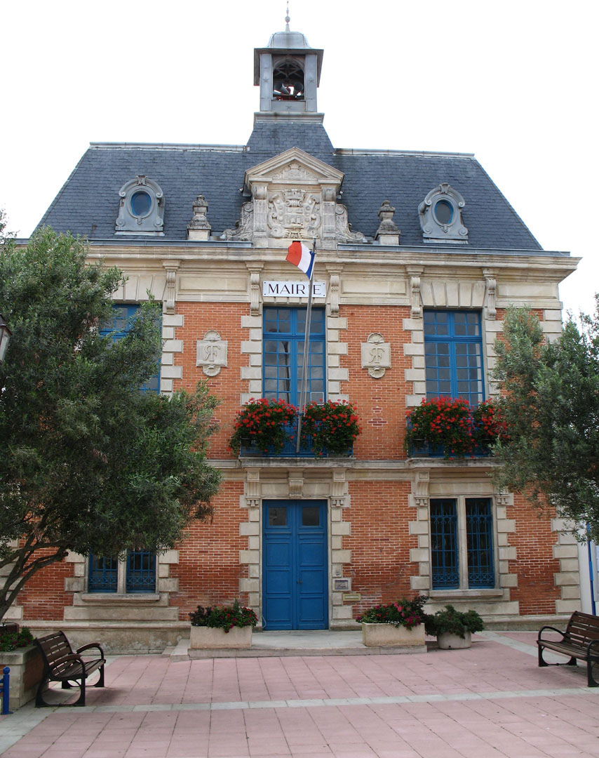 Mairie de Fouras, France